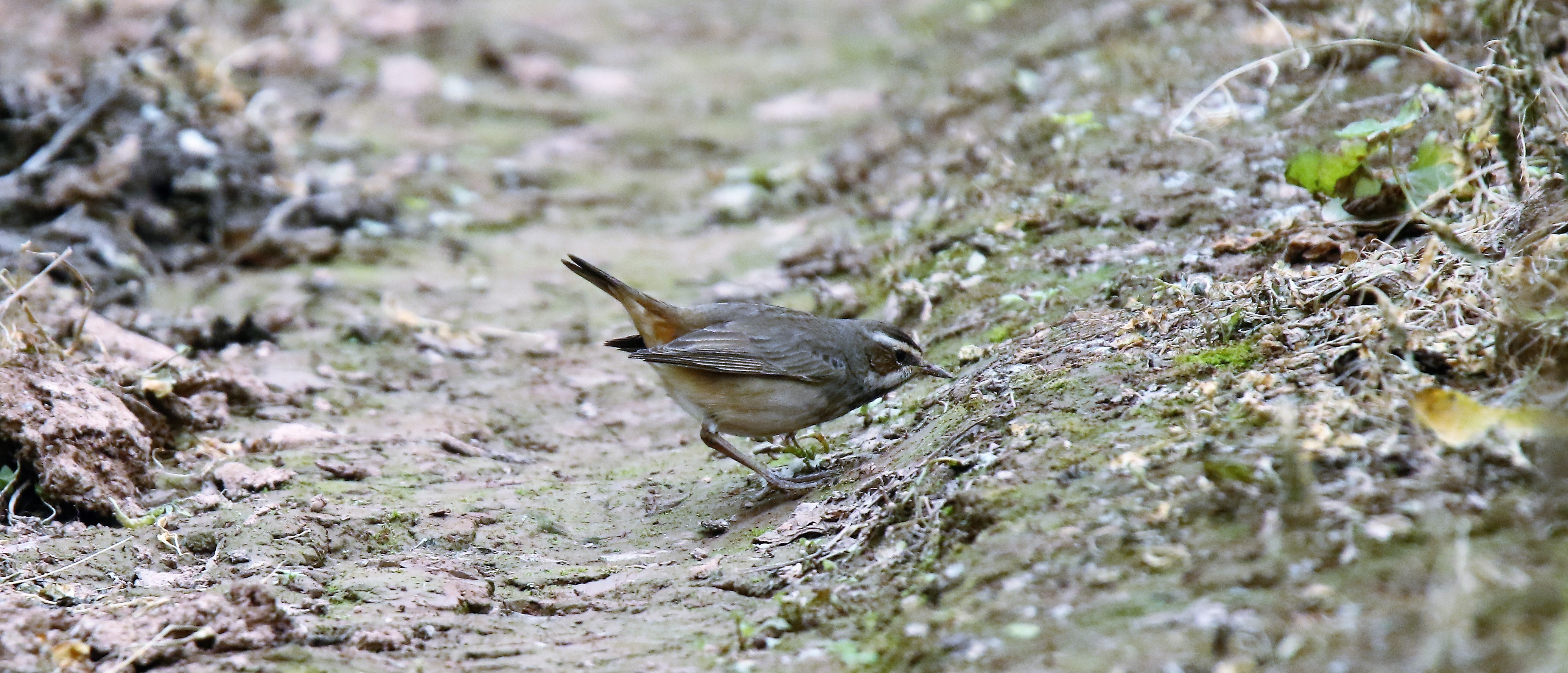 Bluethroat (femal)